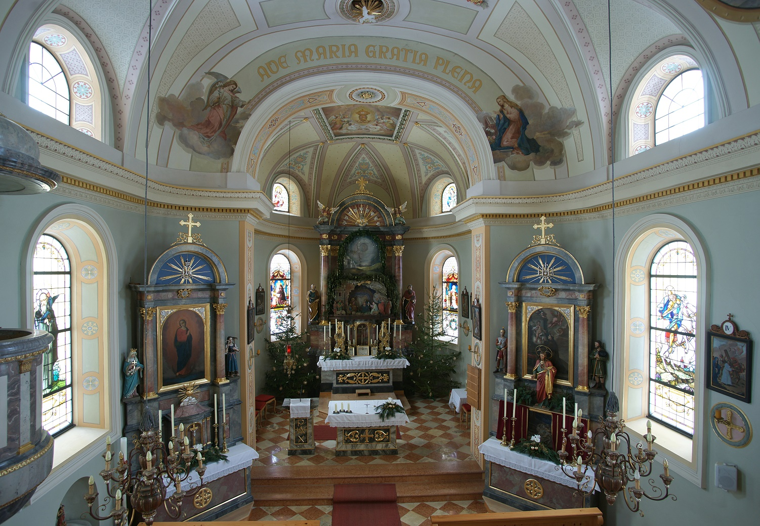 Expositurkirche hl. Josef, Innenansicht